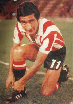 Juan Ramón Verón, con la camiseta de Estudiantes de La Plata, una de las máximas figuras del plantel que se consagró Campeón del Mundo de clubes en 1968.